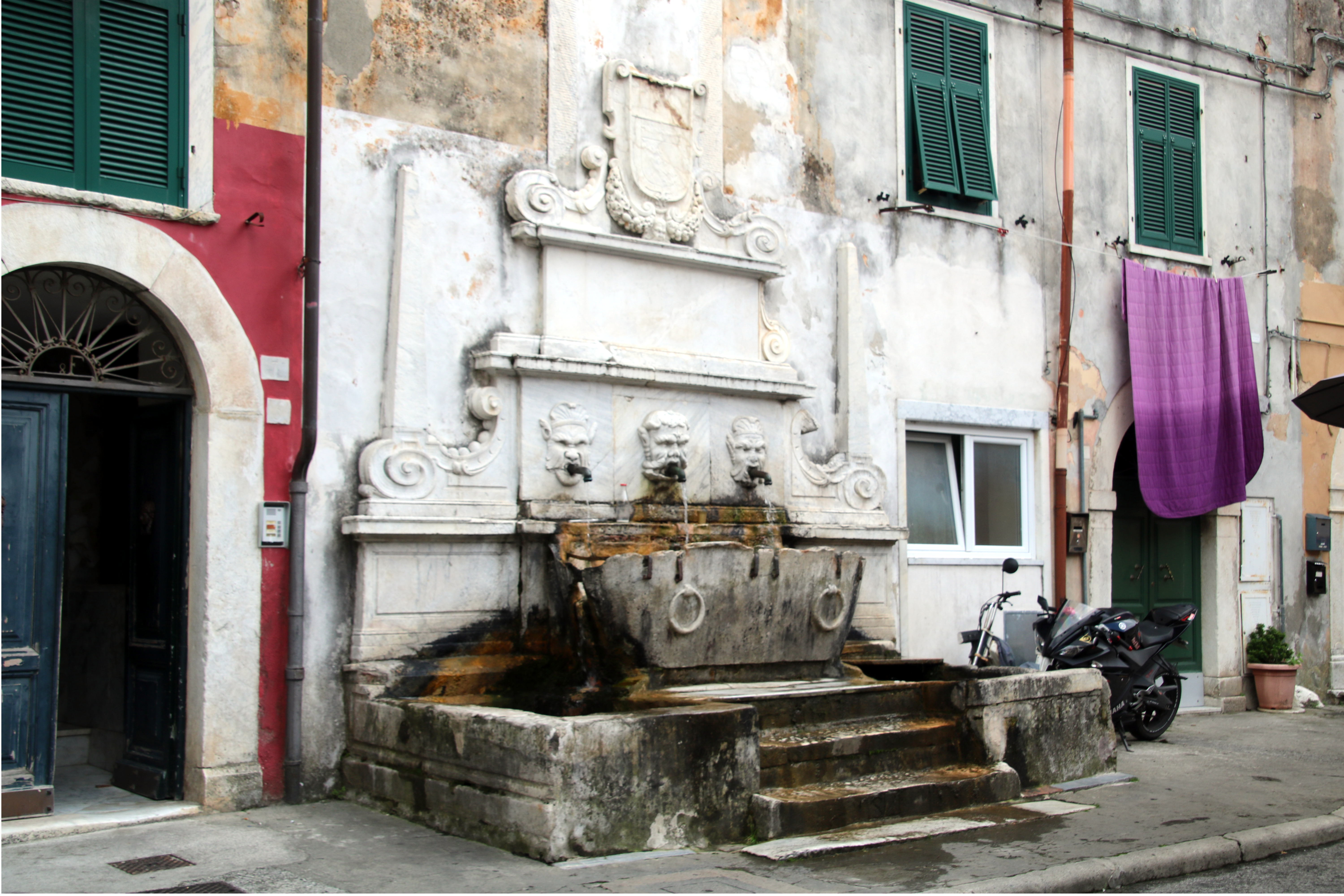 Fontana di Alberico Cybo Malaspina This is a photo of a monument which is part of cultural heritage of Italy.